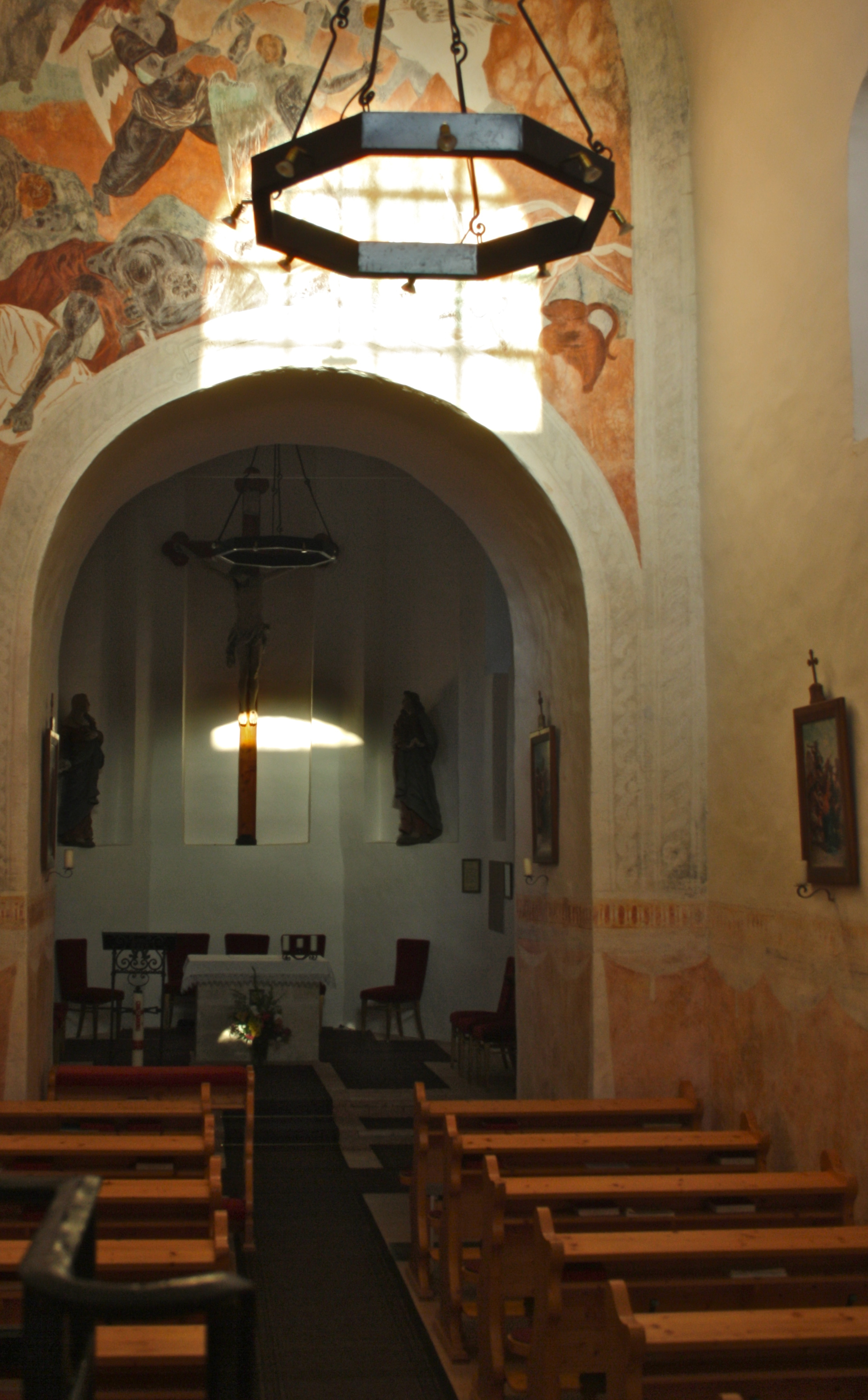 Innenansicht der Philippskirche in Kranichberg.